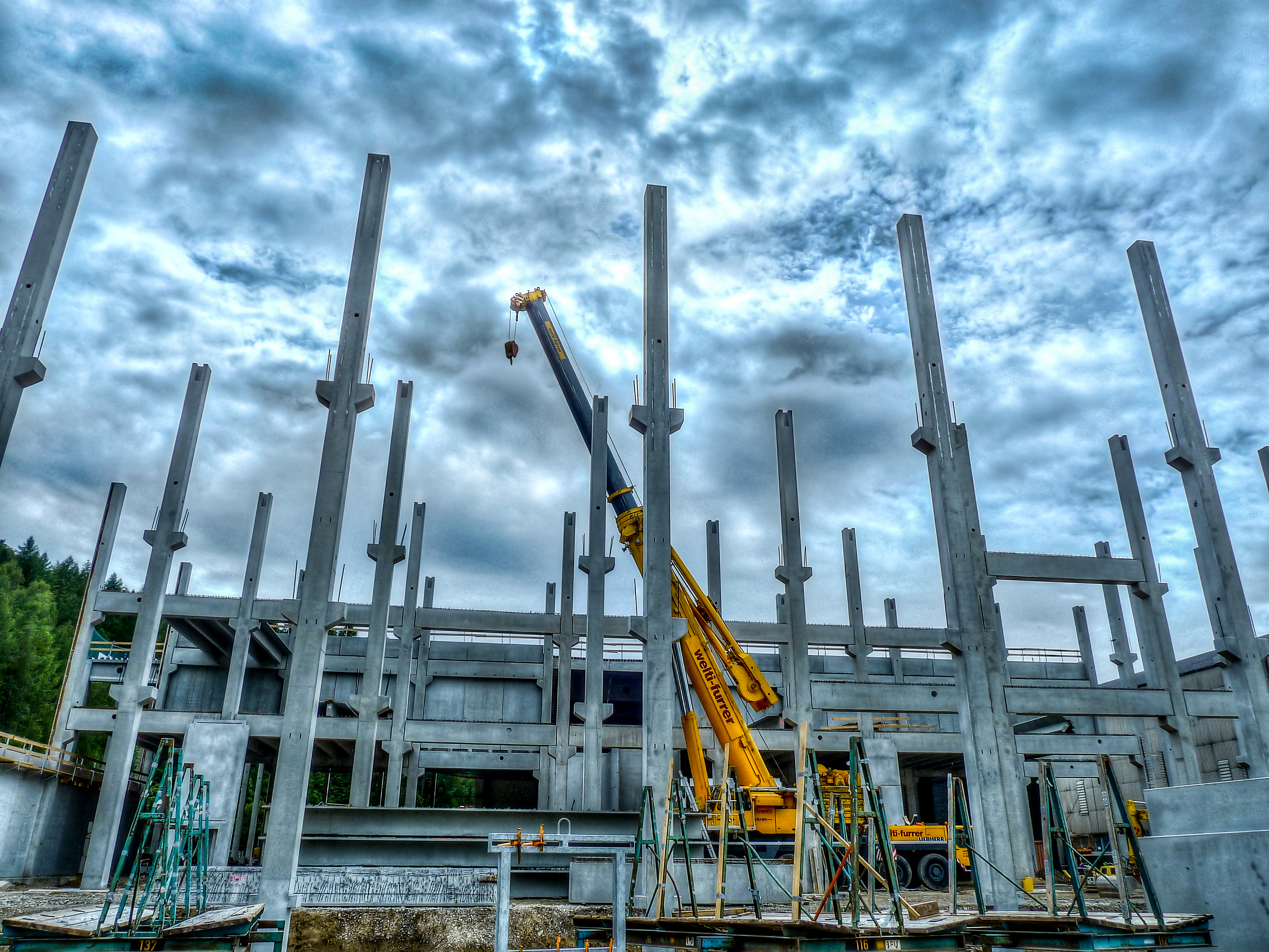 Die Fertigbetonelemente werden getaktet angeliefert. Pro Tag werden 6 dieser Elemente mithilfe eines Pneukrans montiert. Baustelle für die Rhenus Contract Logistics AG in Schaffhausen.